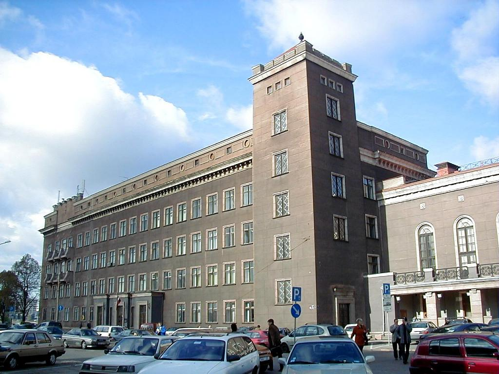 Rīgas Tehniskā universitāte 2002-10-02